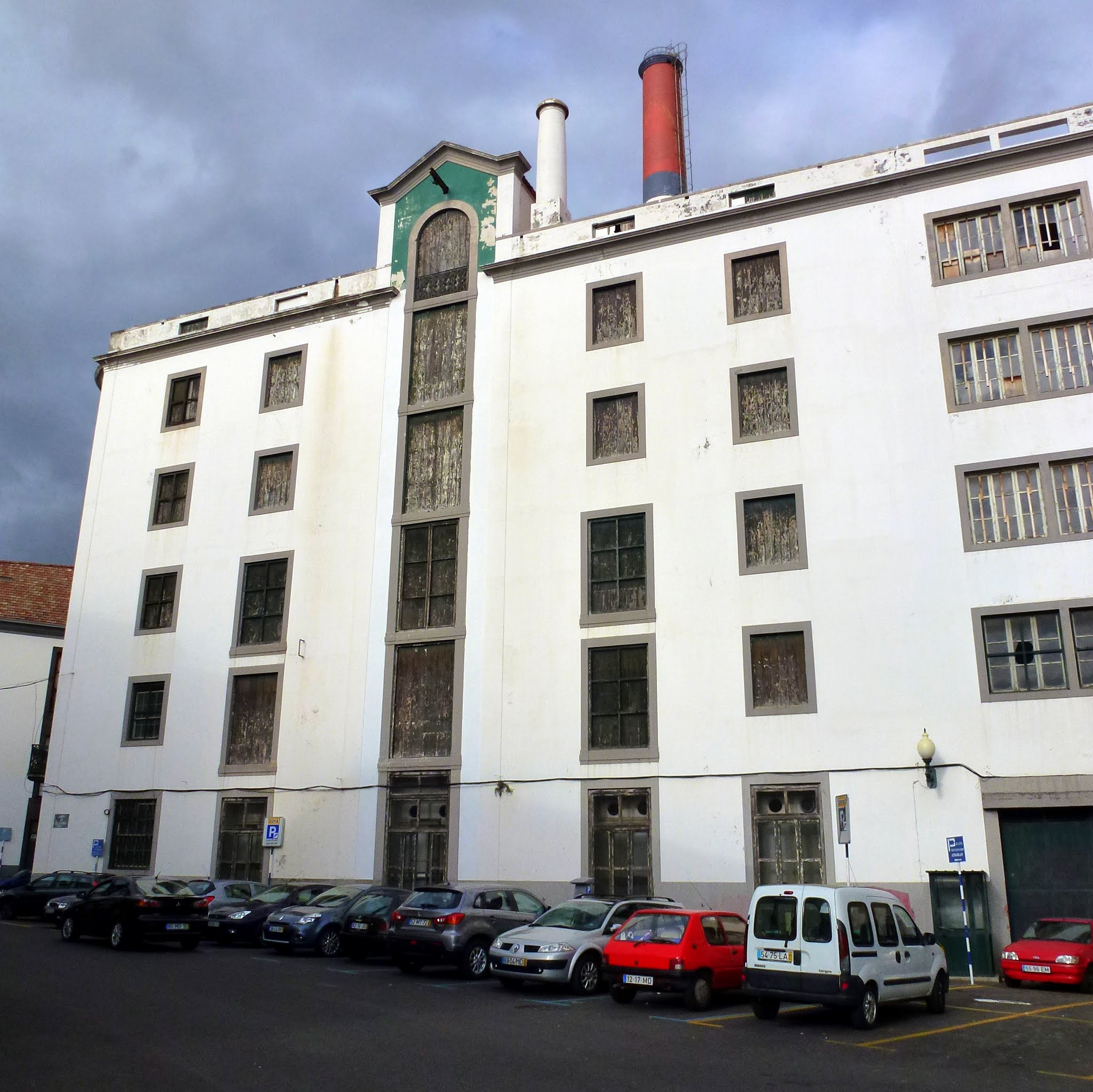 Funchal, Madeira - Companhia Insular de Moinhos